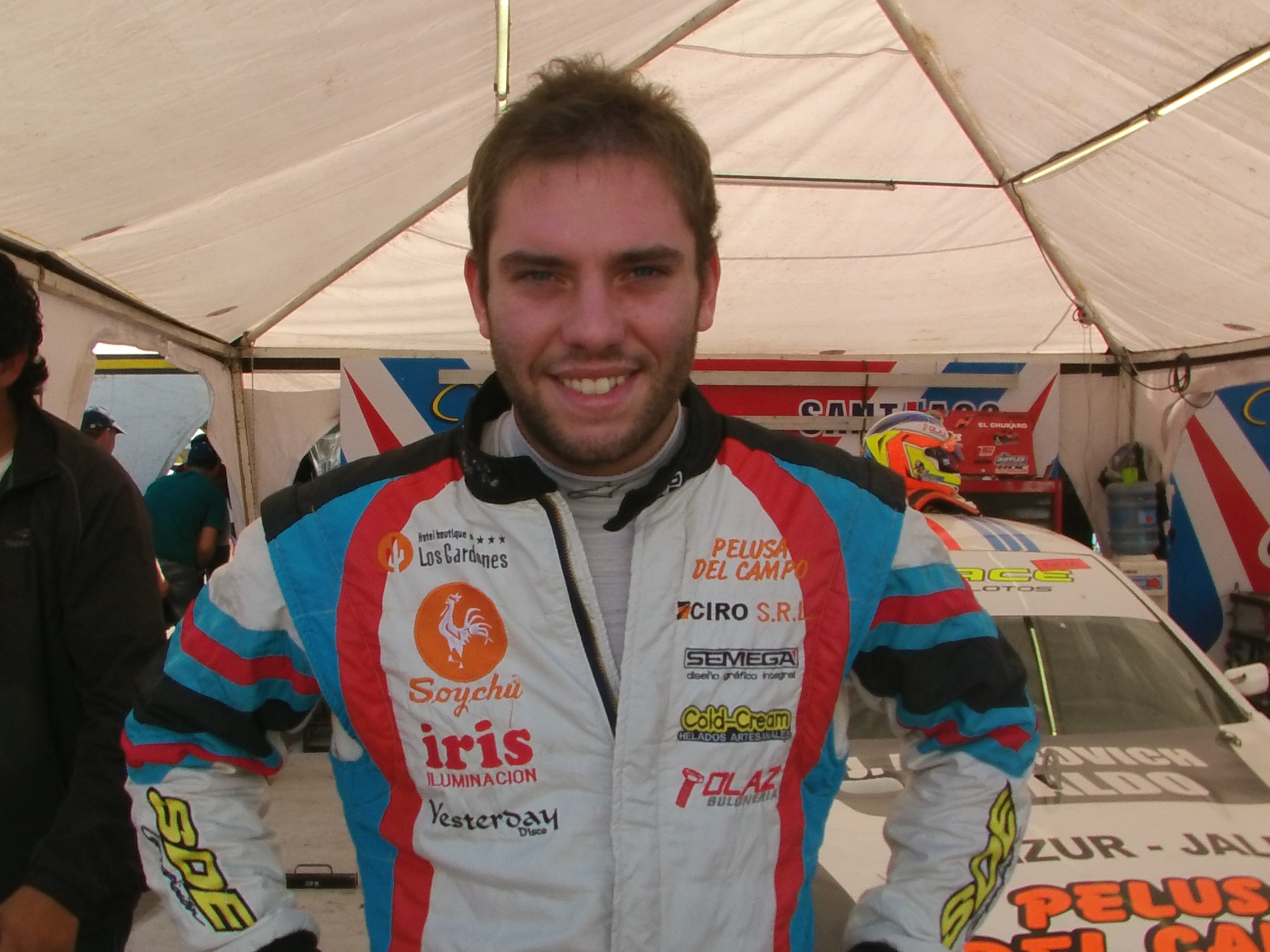 Fotografía del piloto argentino de automovilismo de velocidad, Peter Olaz